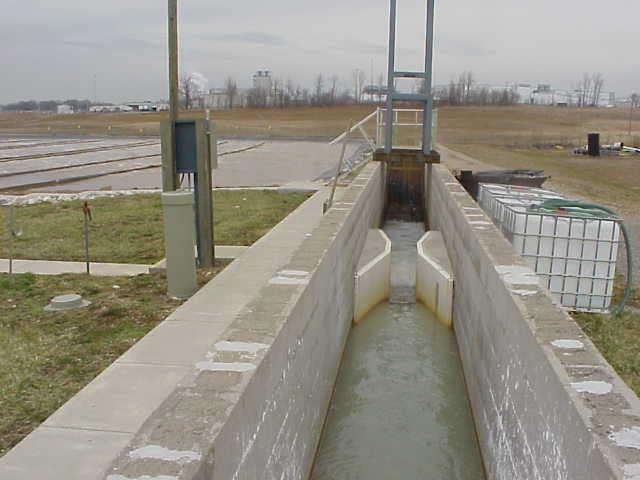 Venturi latakas nuotekų valykloje